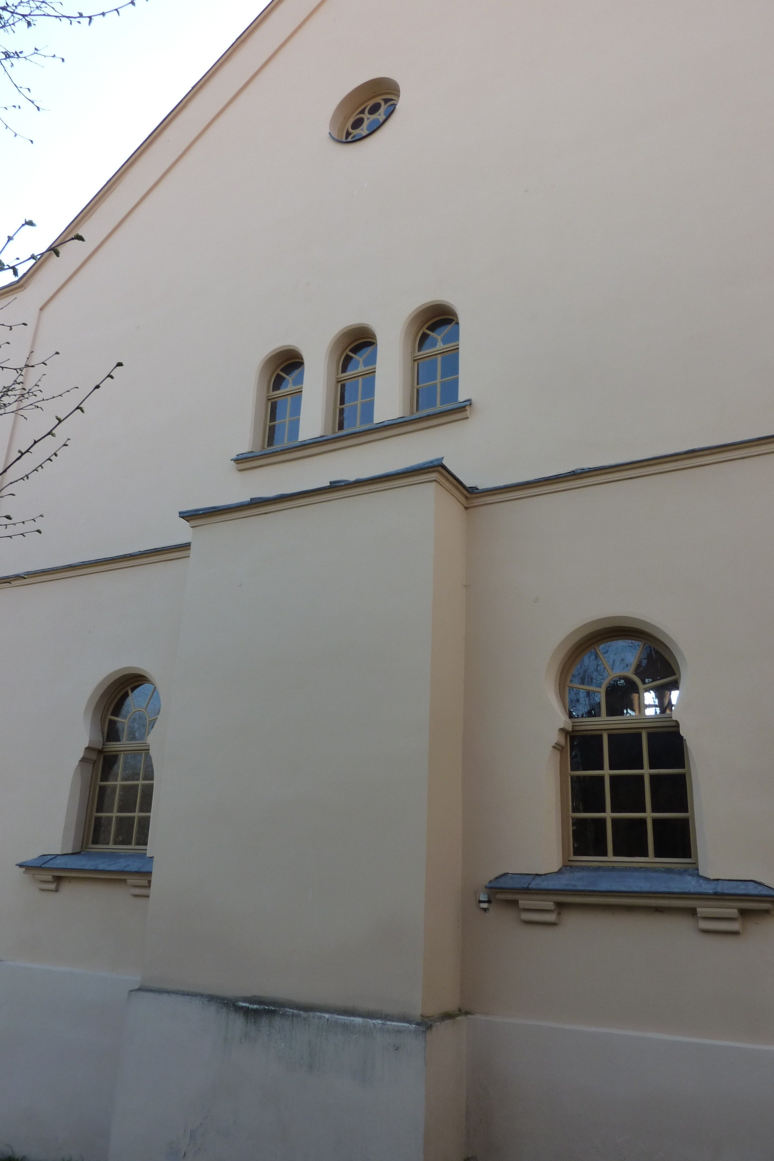 Synagoge in Hainsfarth, Ostseite mit Toraerker